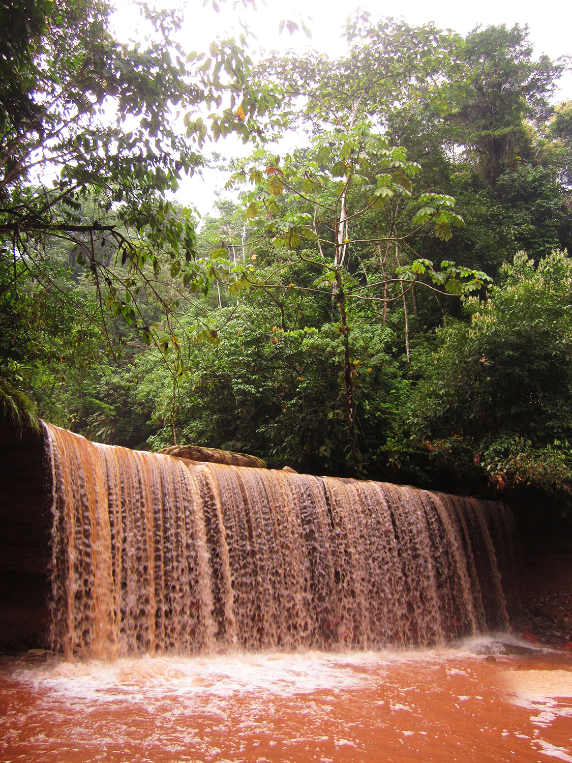 Cascada Cortina de Uchiza